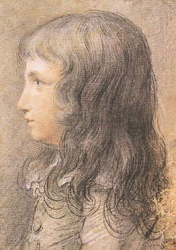 LouisXVII age8